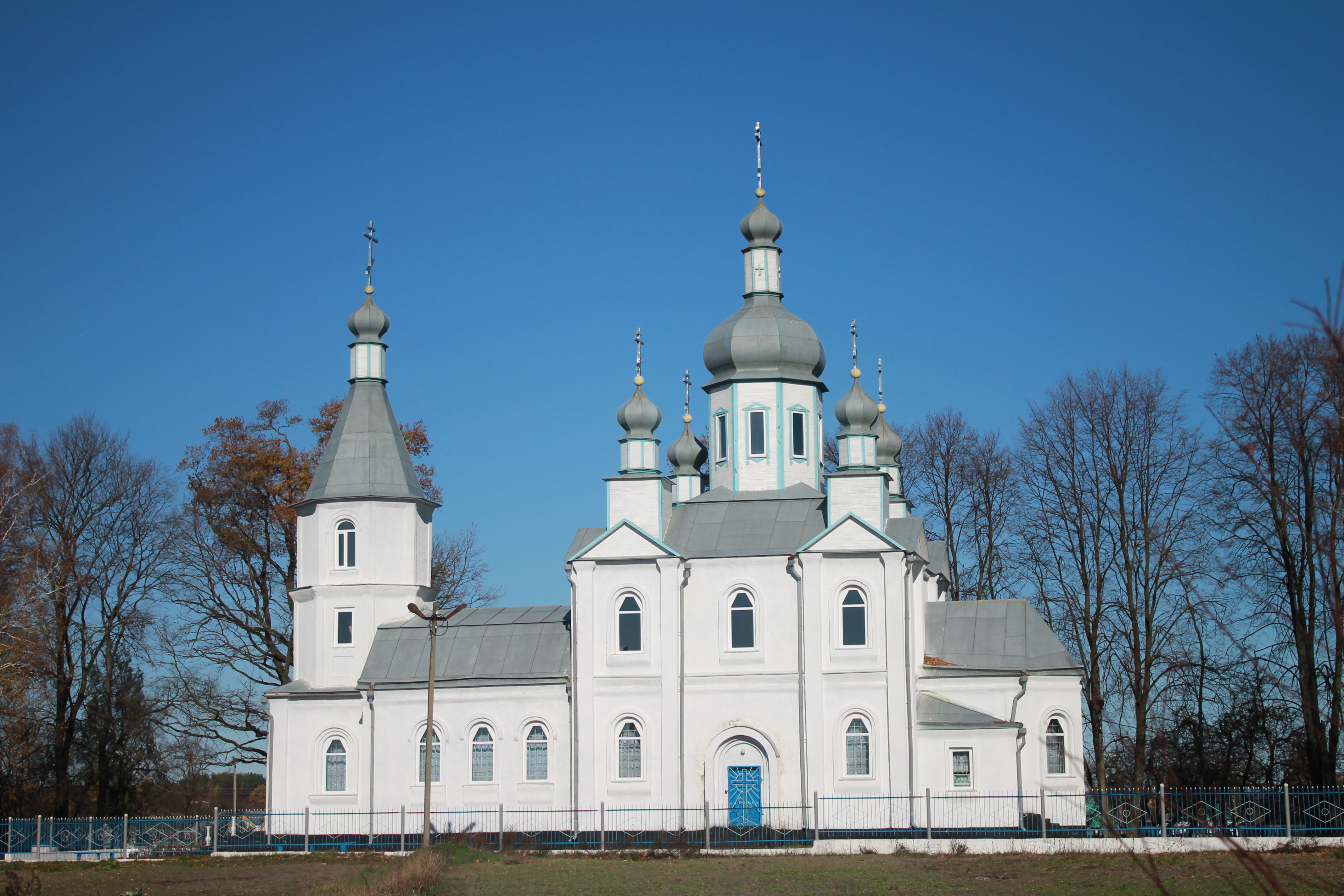 Церква у с. Лісівщина, Коростенський район